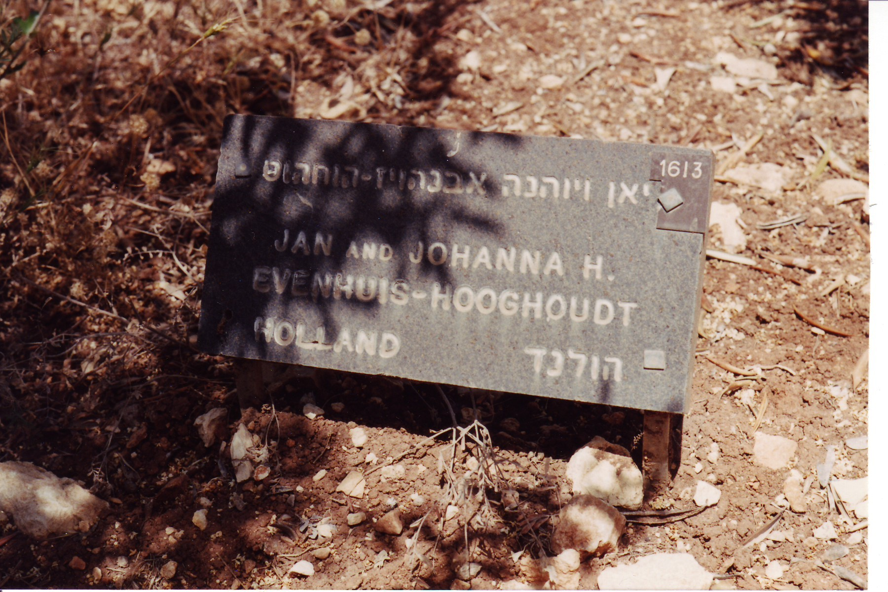 Foto uit 1995 van het plaquaat naast de boom van Jan Evenhuis en Johanna H. R. Evenhuis-Hooghoudt in de tuin van de 'Rechtvaardige onder de Volkeren' in Jad Wasjem